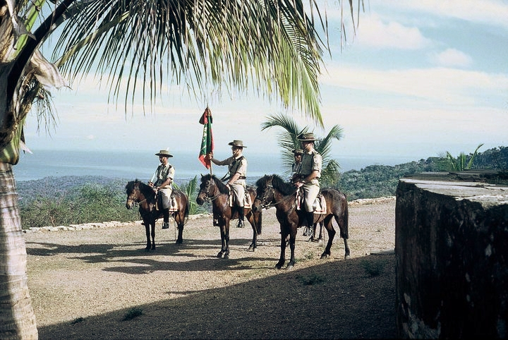 A escola a cavalo prestes a ser incorporada na formatura